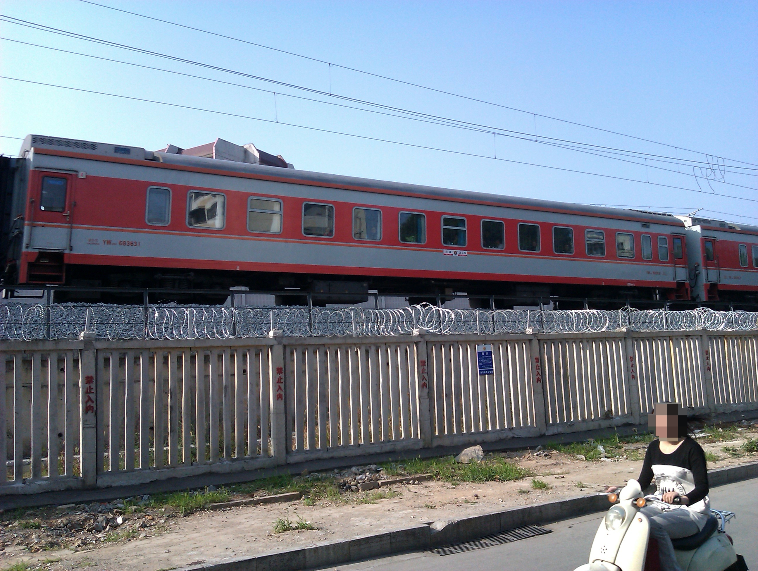 K21次列车上的硬卧车车体